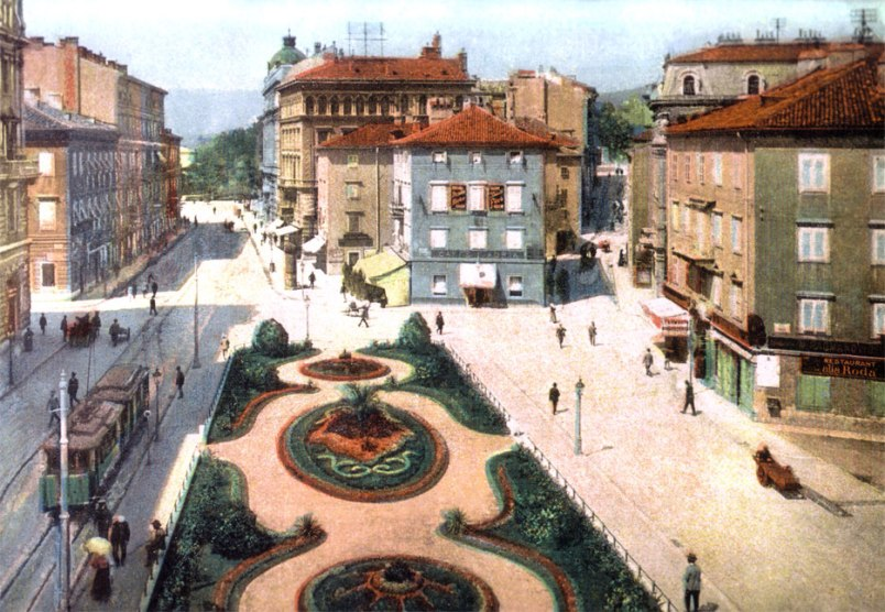 jadranski trg, nekad